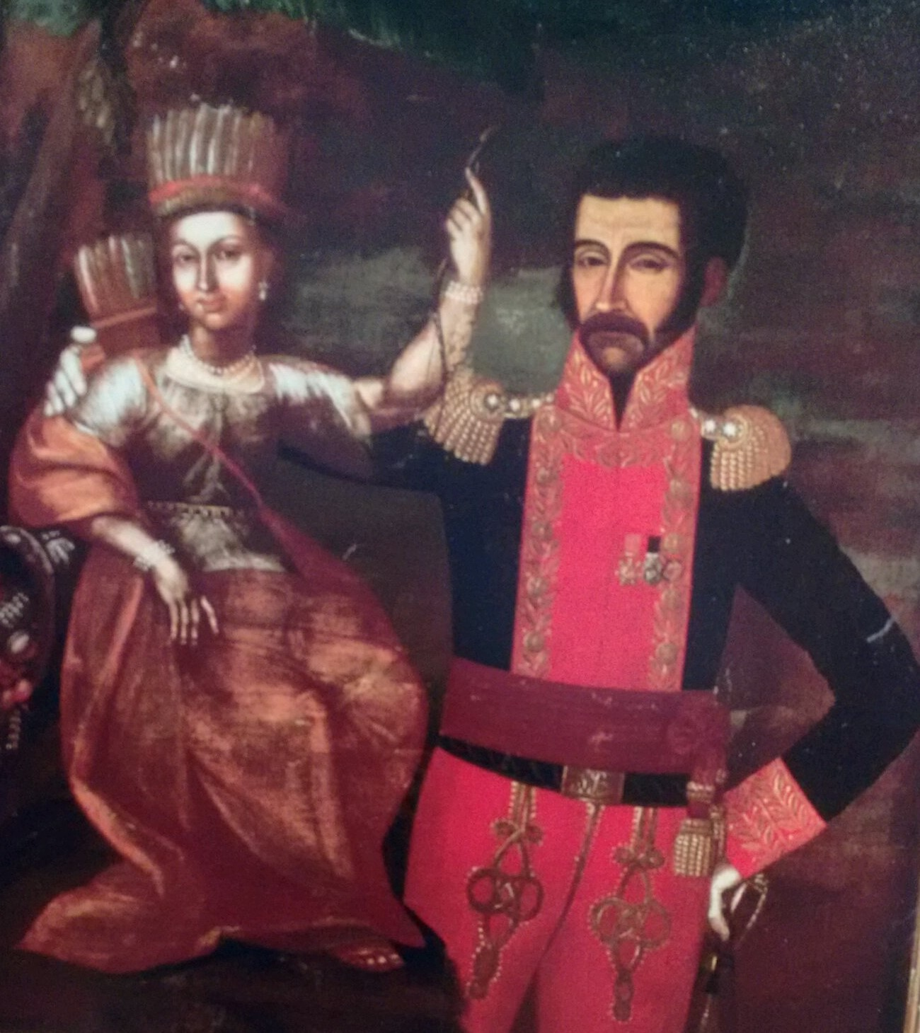 Representación Gran Colombia Indígena de 1819, reconocimiento absoluto de los territorios y derechos indígenas. Ley 89 de 1819.